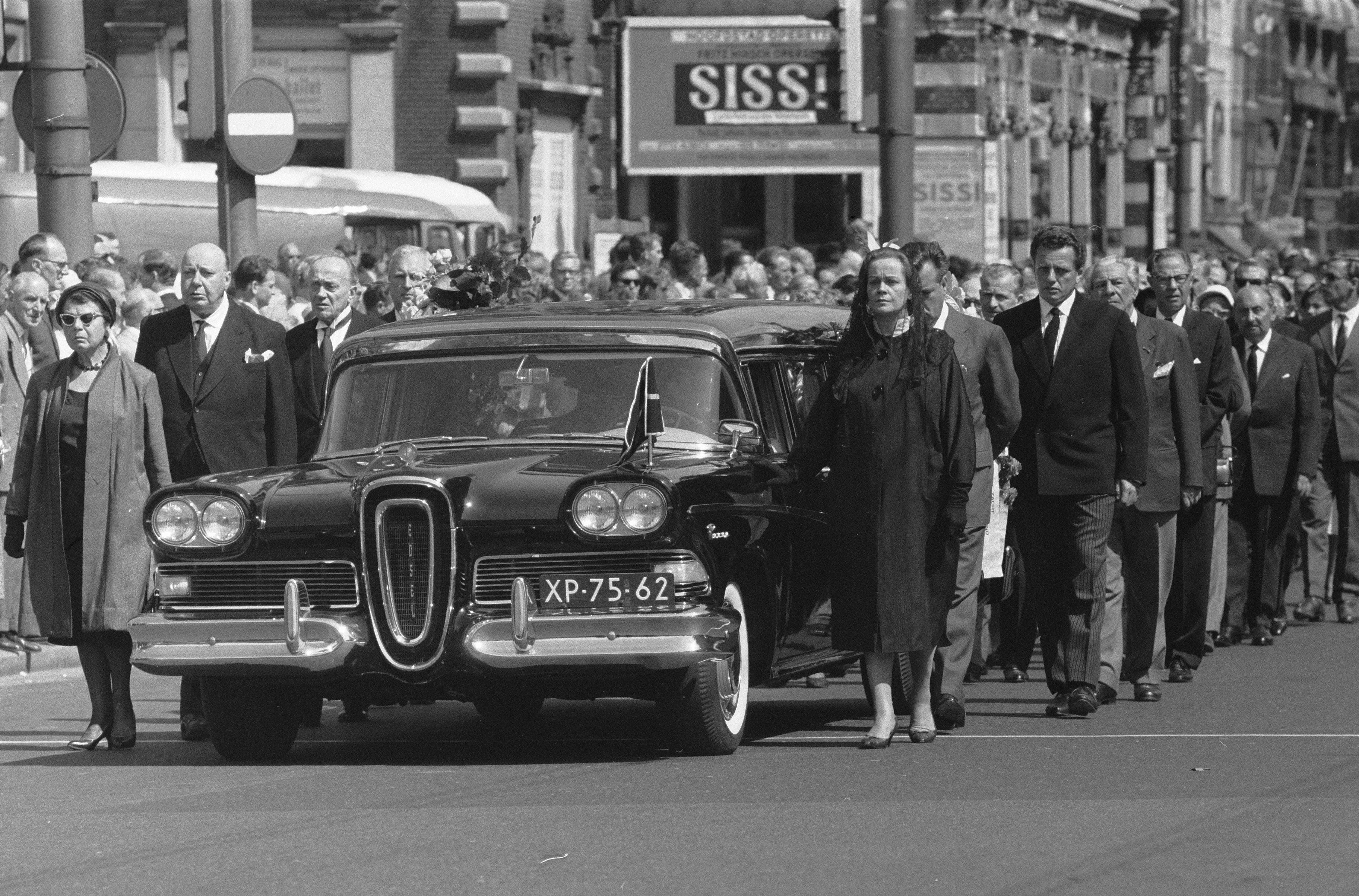 Collectie / Archief : Fotocollectie Anefo Reportage / Serie : [ onbekend ] Beschrijving : Uitvaart acteur Frans van Dijk. Links Marie Hamel, Albert van Dalsum en Paul Huf, rechts Elisabeth Homans, Ko van Dijk, Robert de Vries en Louis van Gasteren Datum : 8 augustus 1960 Locatie : Amsterdam, Noord-Holland Trefwoorden : lijkwagens, uitvaarten Persoonsnaam : Dalsum, Albert van, Dijk, Ko van, Gasteren, Louis van, Homans, L., Homel, M., Huf, Paul, Vries, R. de Fotograaf : Pot, Harry / Anefo Auteursrechthebbende : Nationaal Archief Materiaalsoort : Negatief (zwart/wit) Nummer archiefinventaris : bekijk toegang 2.24.01.05 Bestanddeelnummer : 911-4887